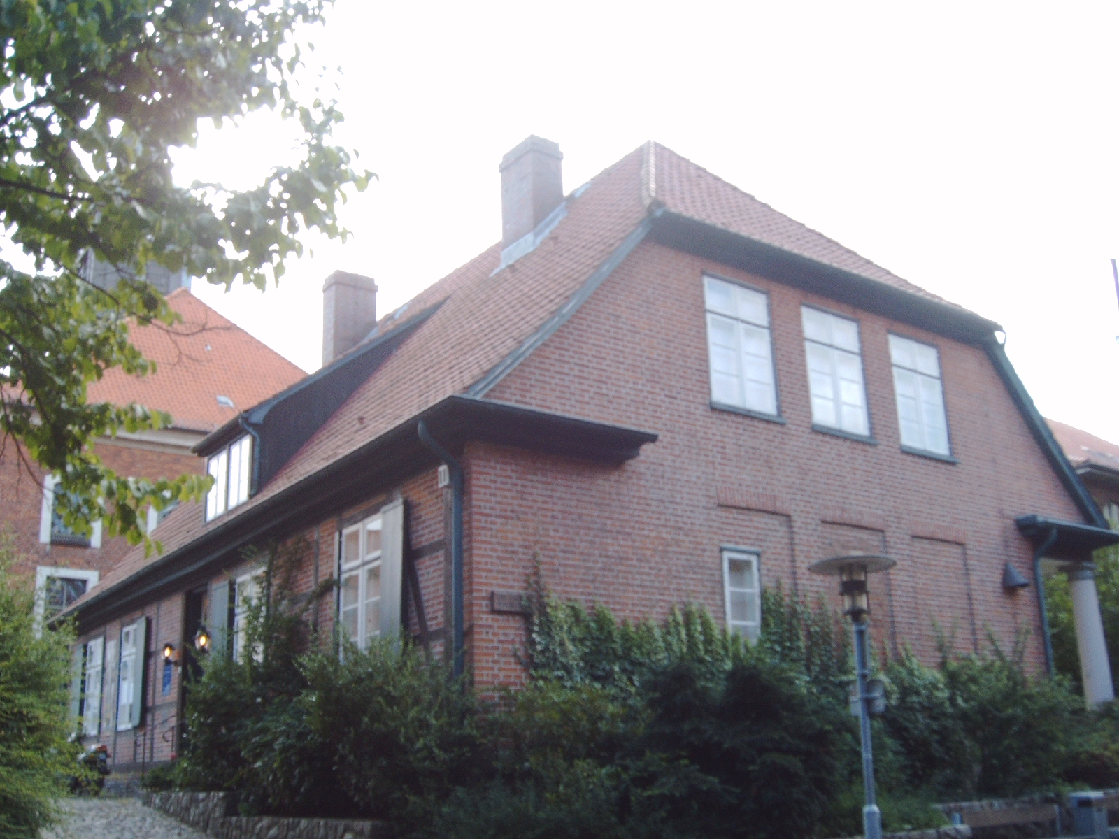 Ernst Barlachs "Vaterhaus" in Ratzeburg Aufnahme: 25.7.2005 Url